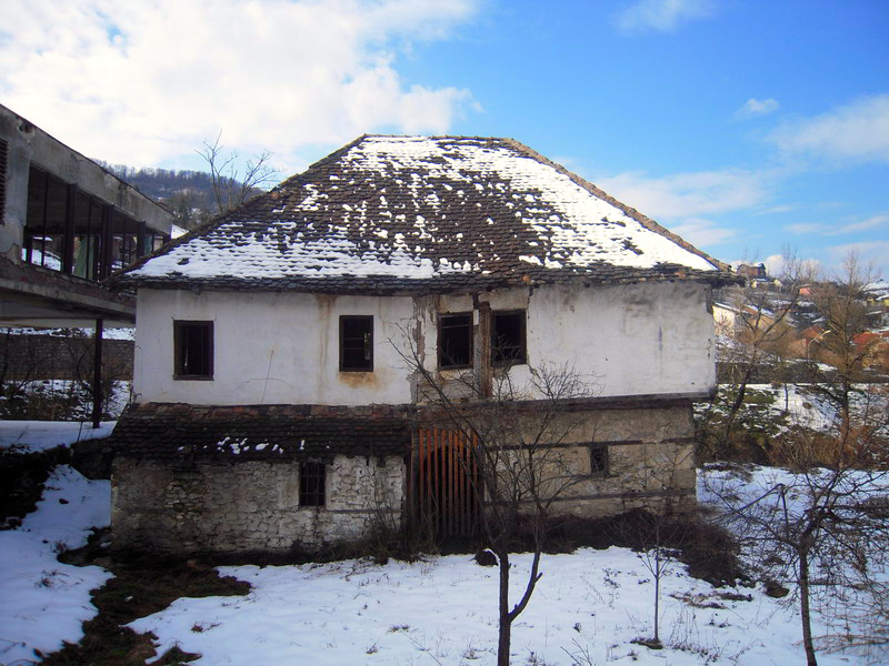 Шеранића кућа.